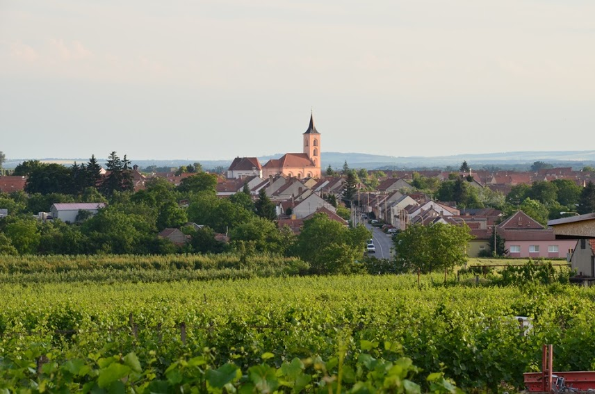 Velké Bílovice, pohled ke kostelu